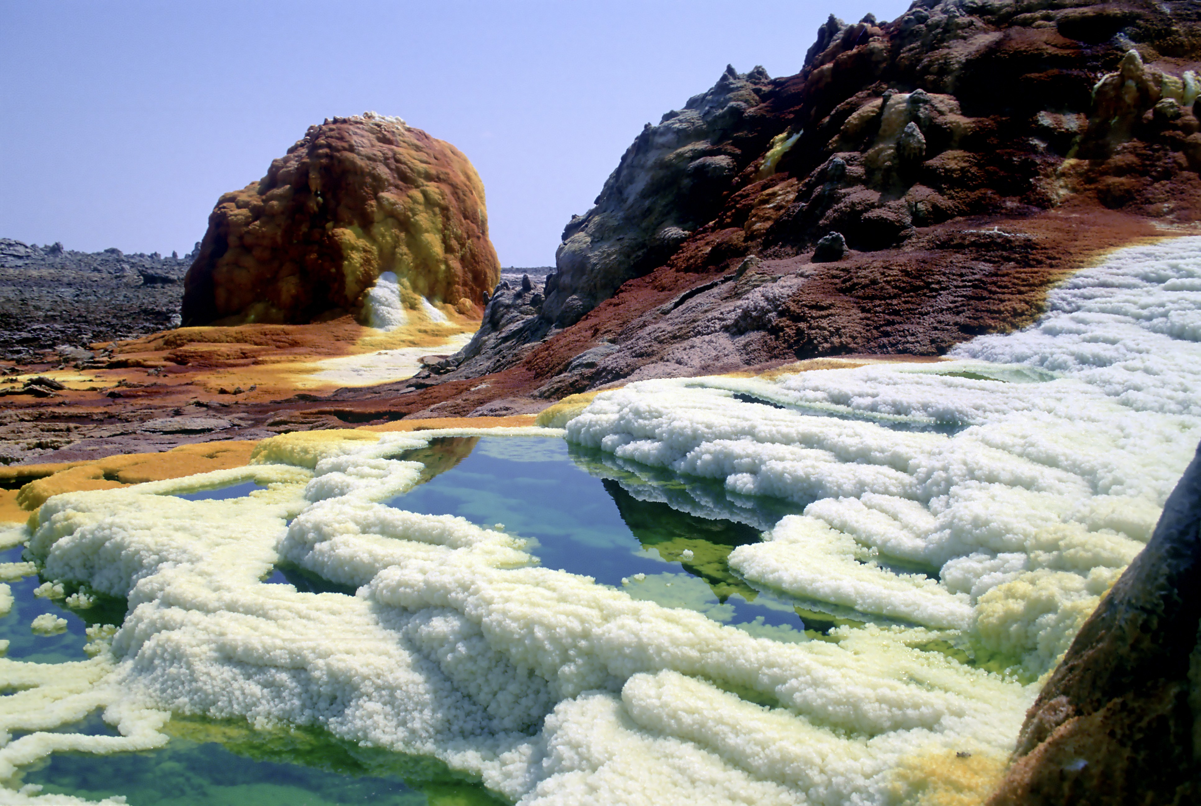 Dallol, flaque d'acide et formation de sel, soufre et autres minéraux